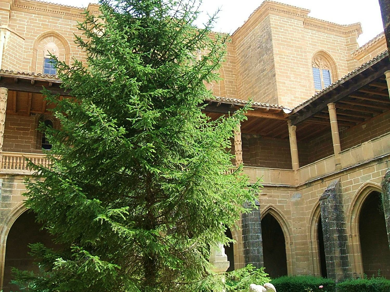 Claustro (siglo XVI) del Monasterio de monjas dominicas de Nuestra Señora de la Piedad, en Casalarreina, La Rioja, España/Spain